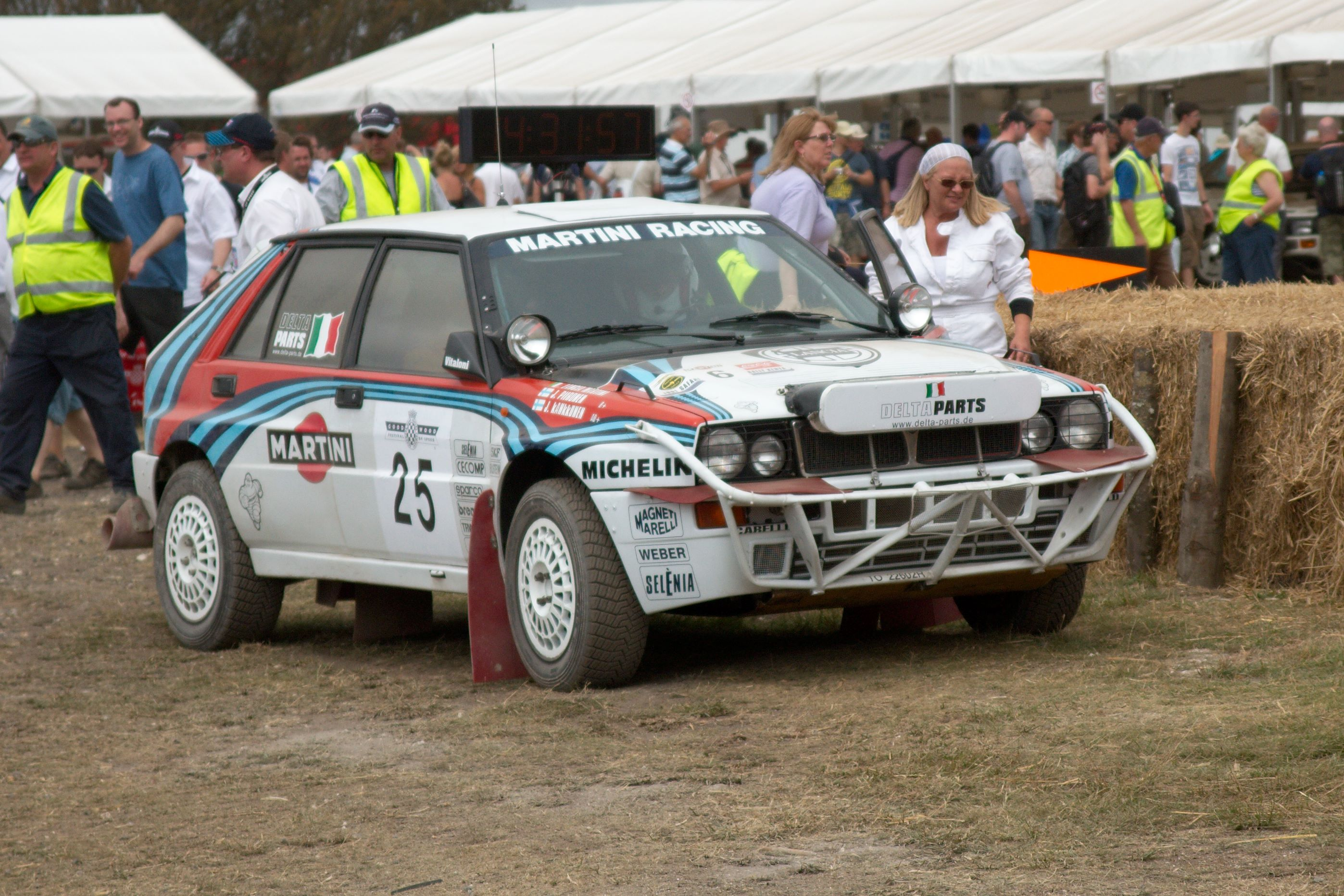 Lancia Delta Integrale